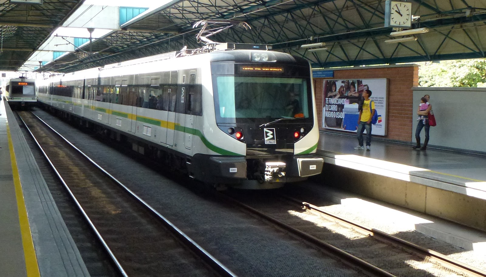 el metro de medellin